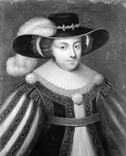 Renée de Clermont d'Amboise, princesse de Cambrai